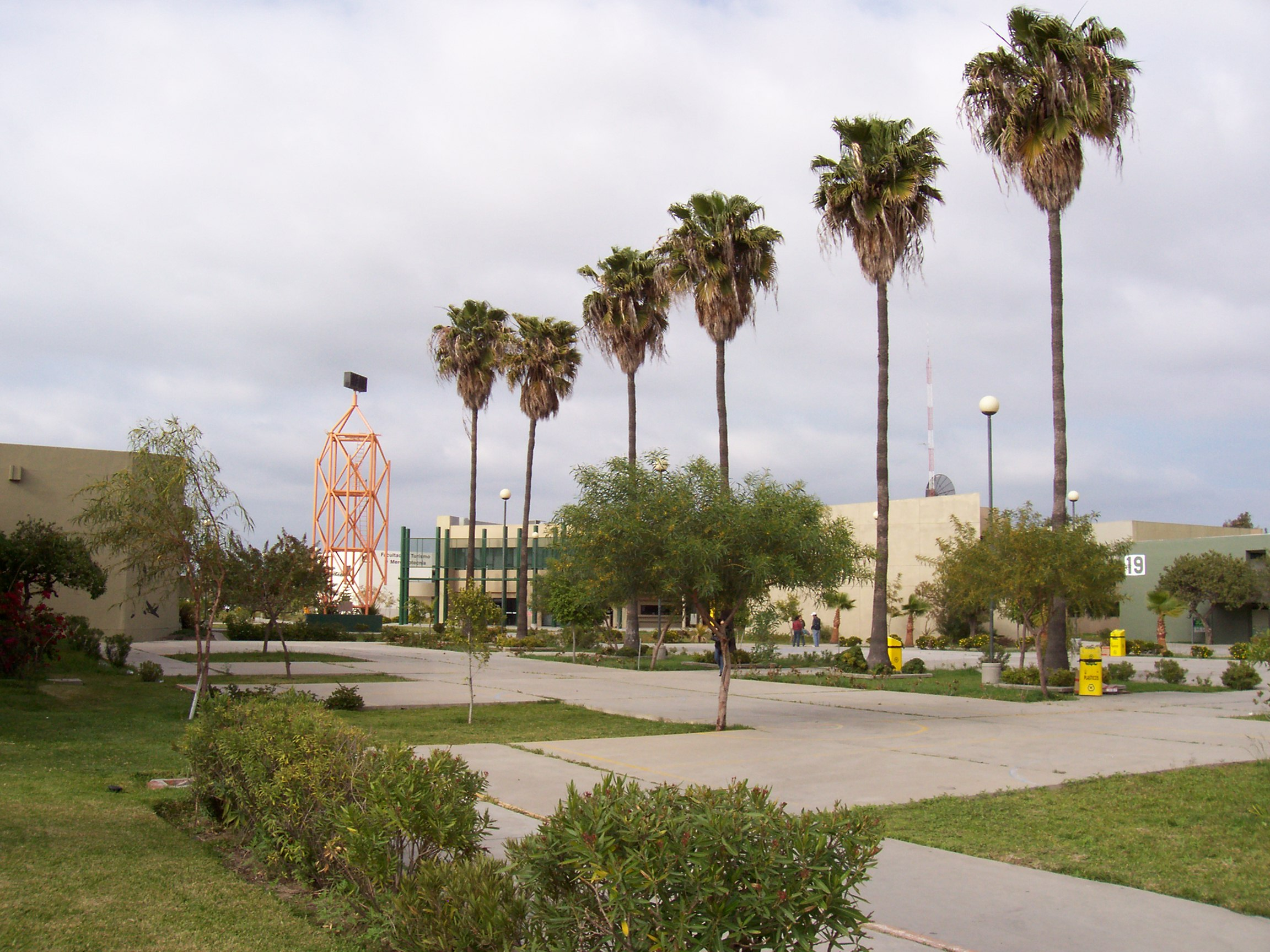 Centro Cumunitario UABC